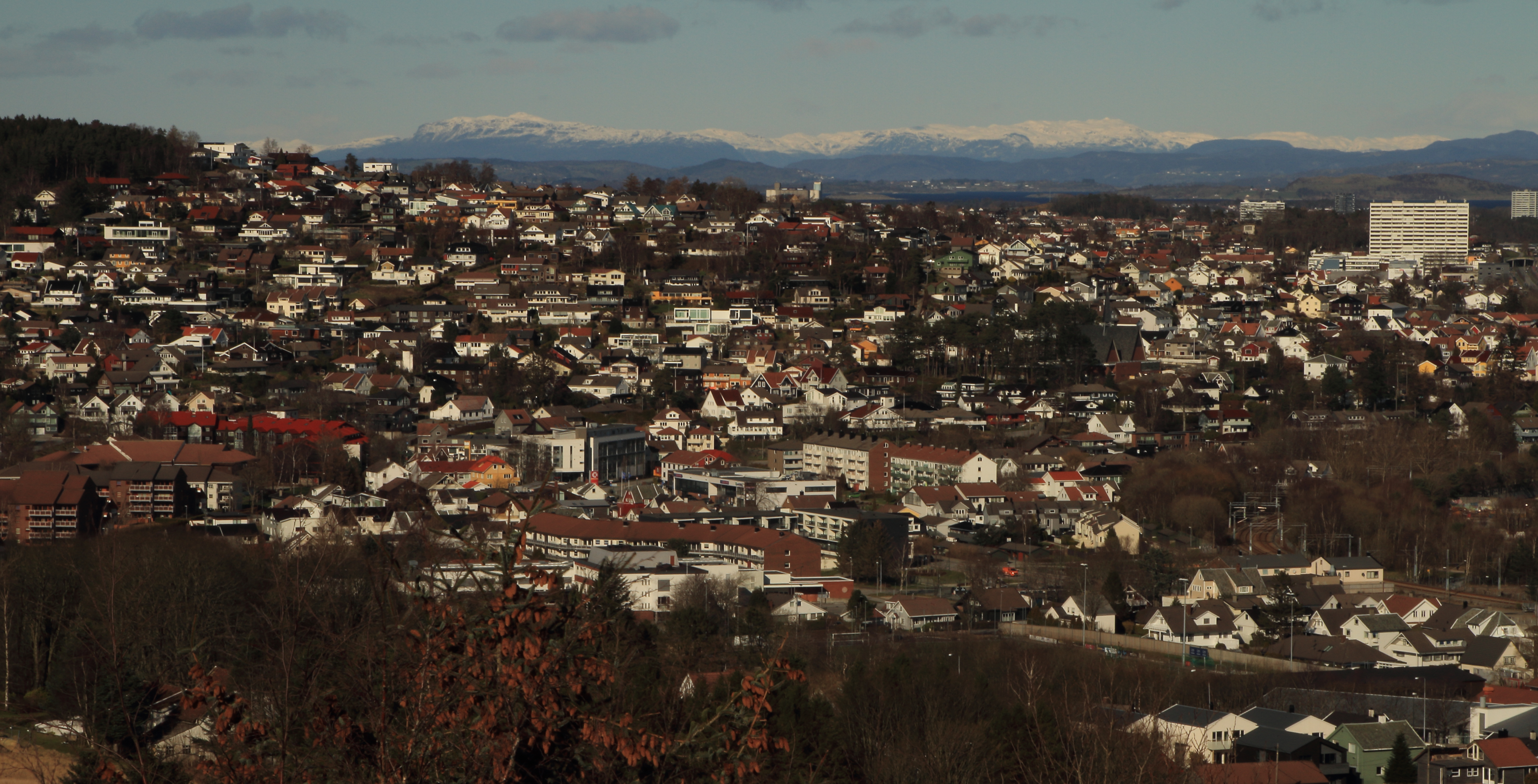 Hinna bydel i Stavanger, mot nord